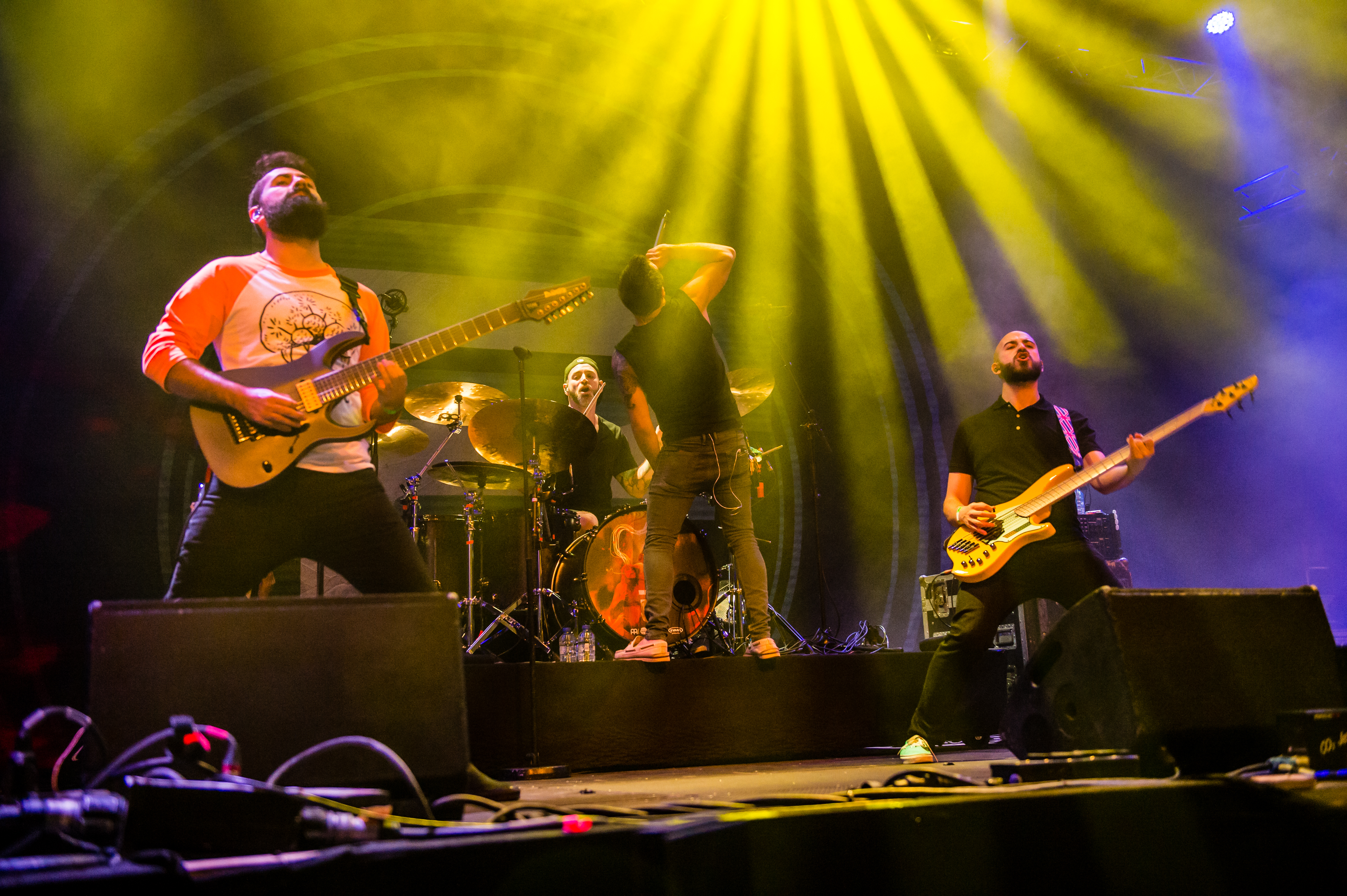 'Periphery - Epic Metal Fest - Eindhoven'